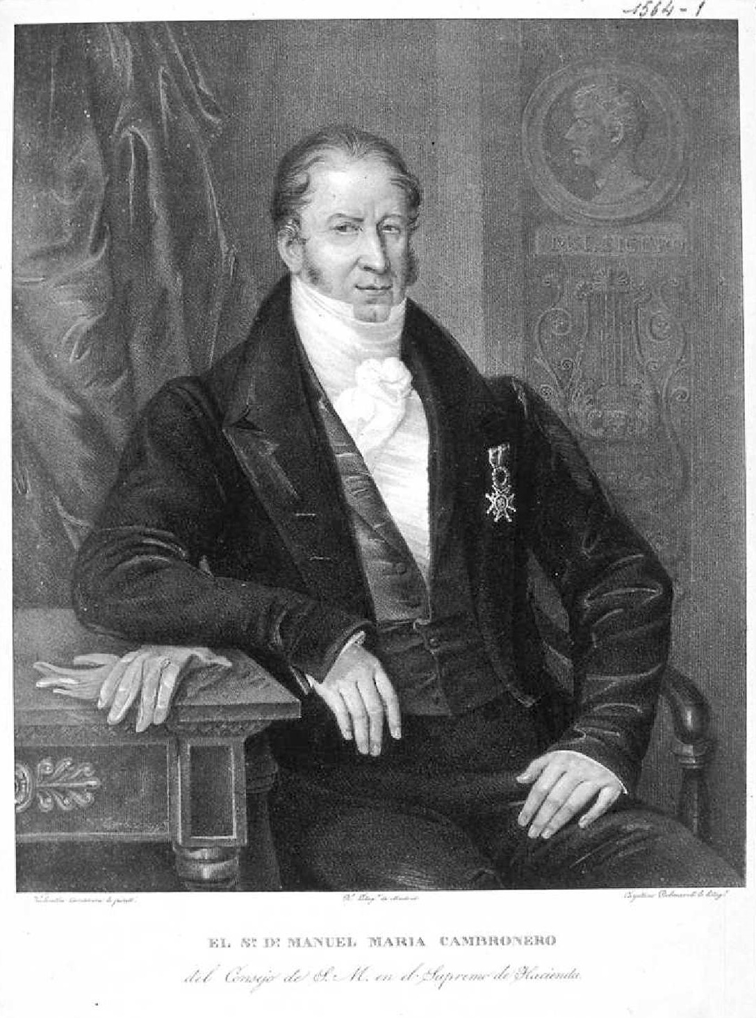 Retrato de Manuel María Cambronero. Litografía de Cayetano Palmaroli según Valentín Carderera. Biblioteca Nacional de España